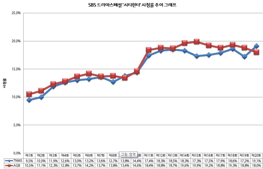 SBS 드라마스페셜 '시티헌터' 전국 시청률 추이 그래프